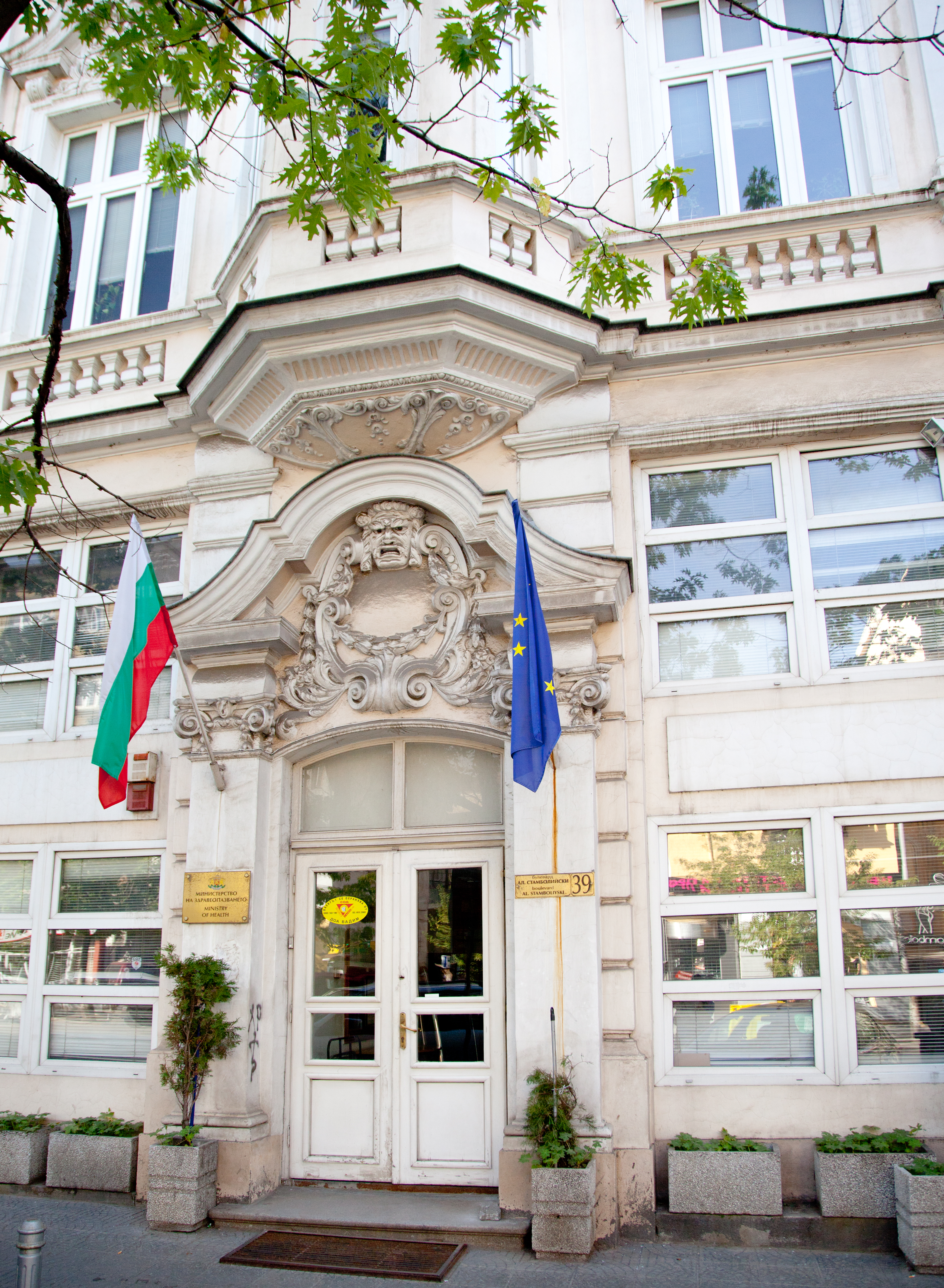 Sofia ,Mininsterium